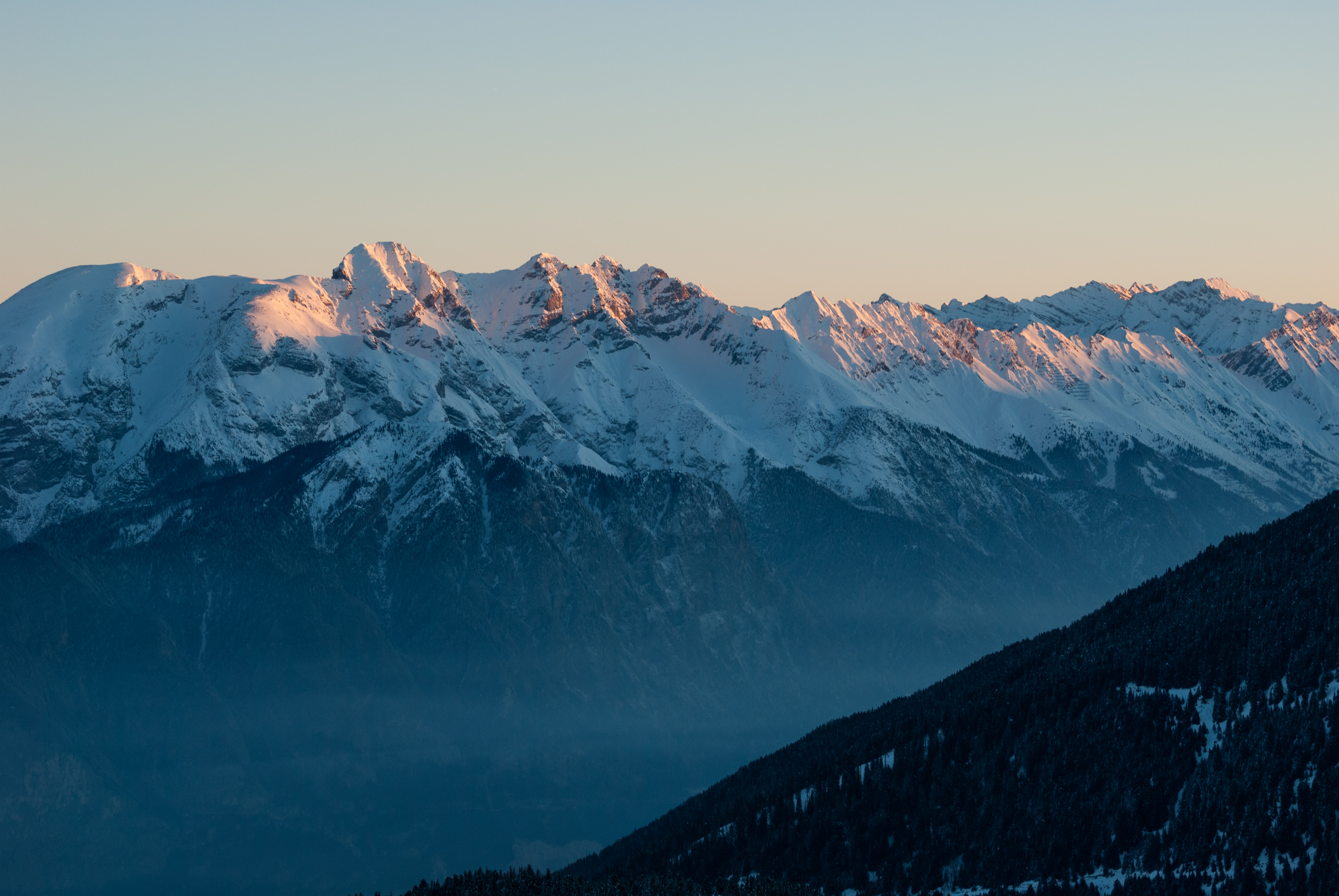 Inntalkette vom Großen Solstein bis zur Rumer Spitze bei Sonnenaufgang